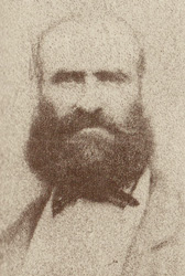 Jacques Marie Anselme Bellegarrigue, né le 23 mars 1813 à Monfort (Gers) et présumé décédé vers la fin du XIXe siècle en Amérique centrale, est un anarchiste fédéraliste.